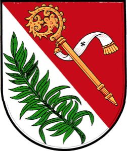 znak obce Samotišky